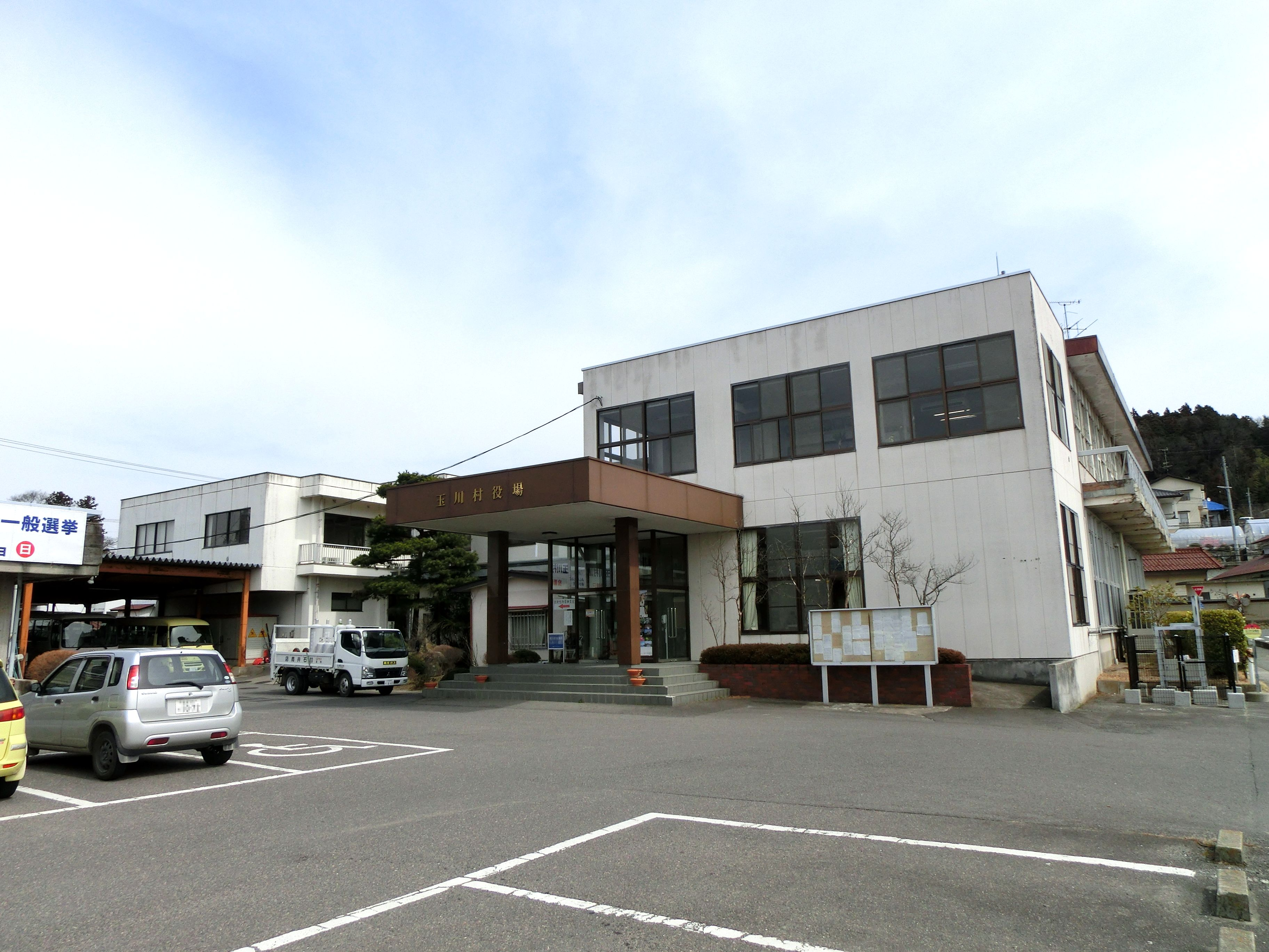 玉川村役場